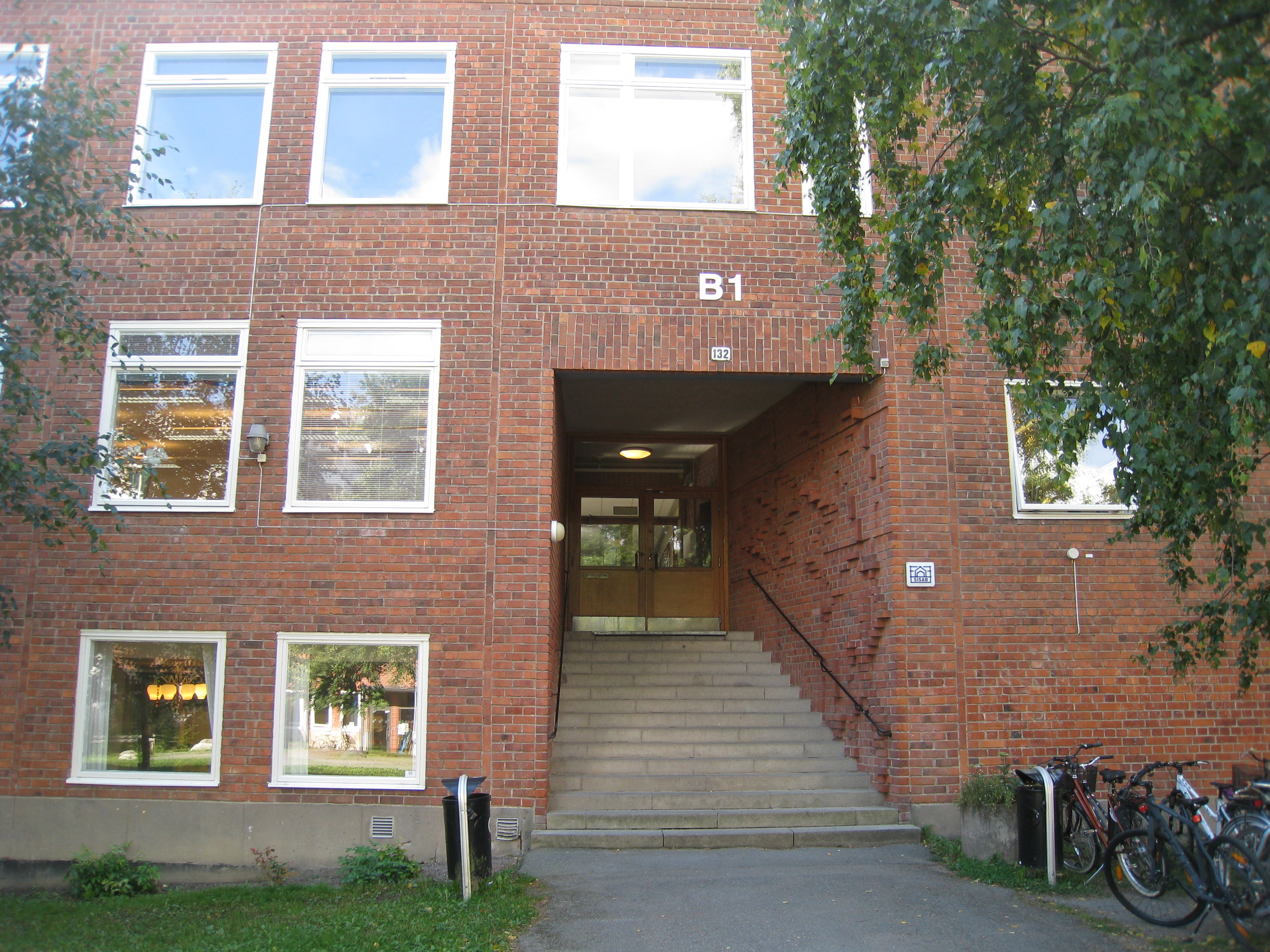 Blackebergsskolan på Björnsonsgatan 132 i Blackeberg i Bromma. Ingång B1. Byggnaden har adress Björnsonsgatan 132, 134, 124a och 136. Arkitekt Åke E. Lindqvist. Byggår 1951. På de högra sidan av entréfasaden syns en väggdekoration i tegel.